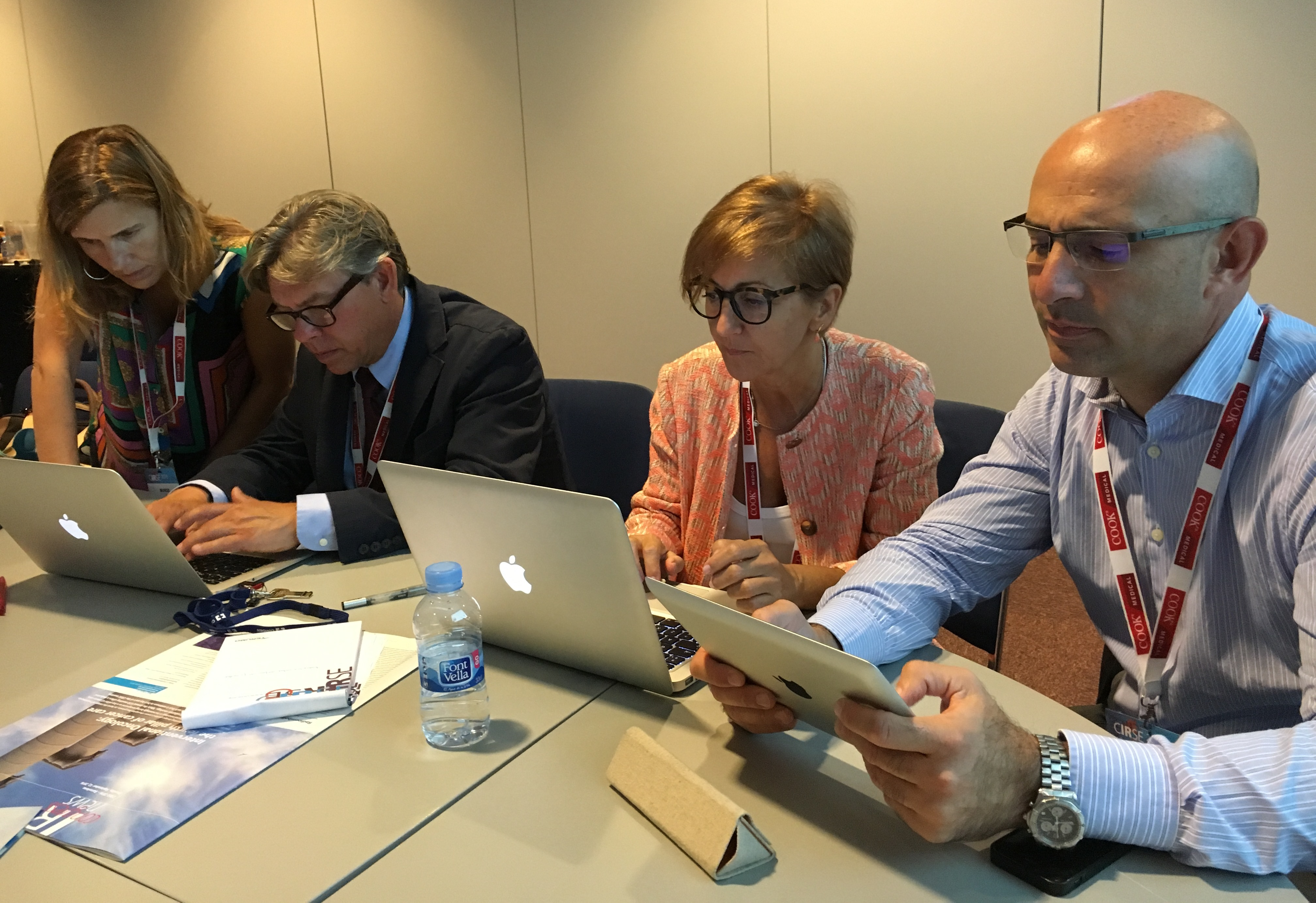 Wikimaratón celebrada en Barcelona sobre Radiología Intervencionista organizada por Wikimujeres y SERVEI durante el congreso internacional CIRSE 2016 con el apoyo de la comunidad médica especialista.